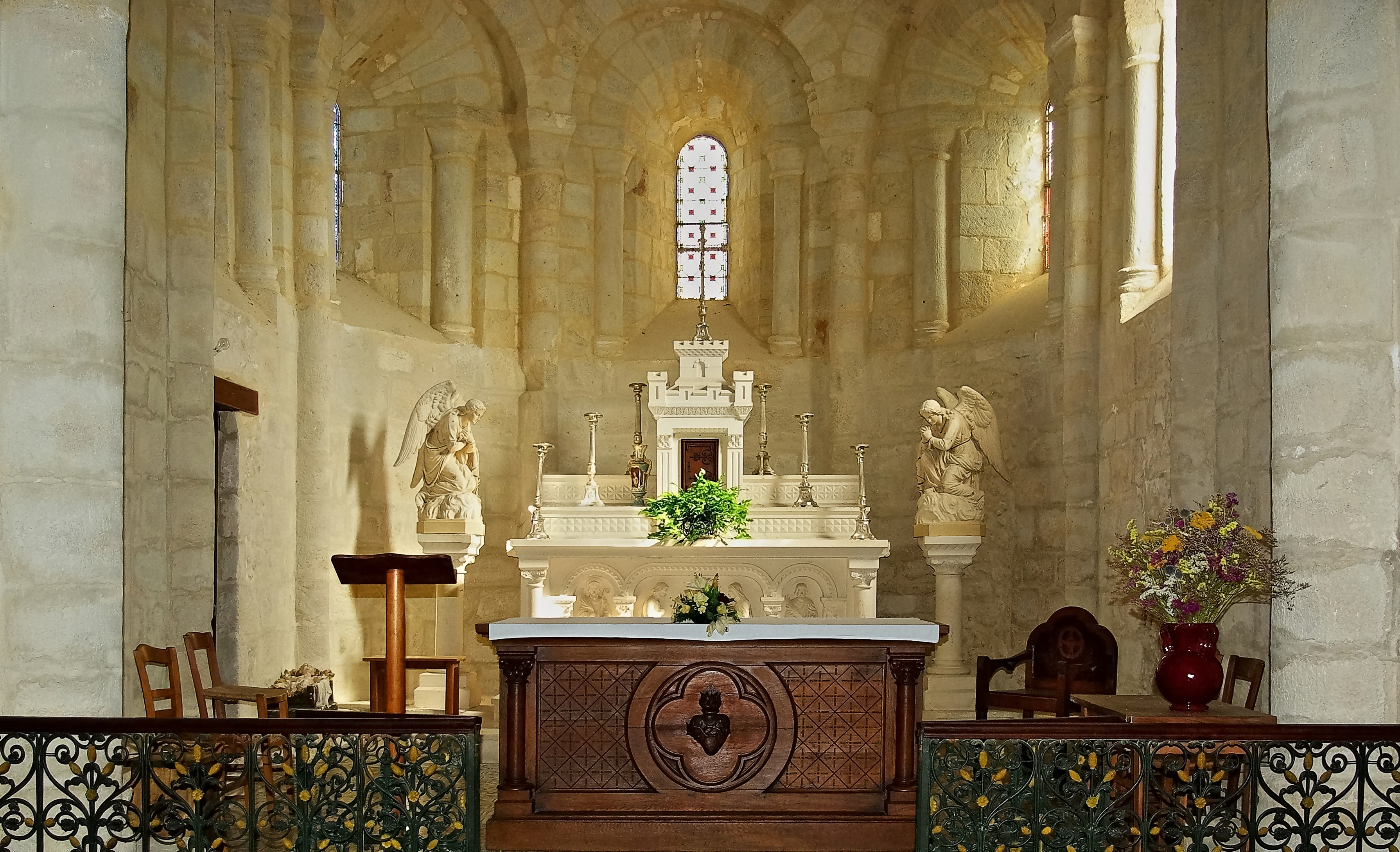 Chœur et autel de l'église Saint-Nazaire de Juignac, Charente, France.